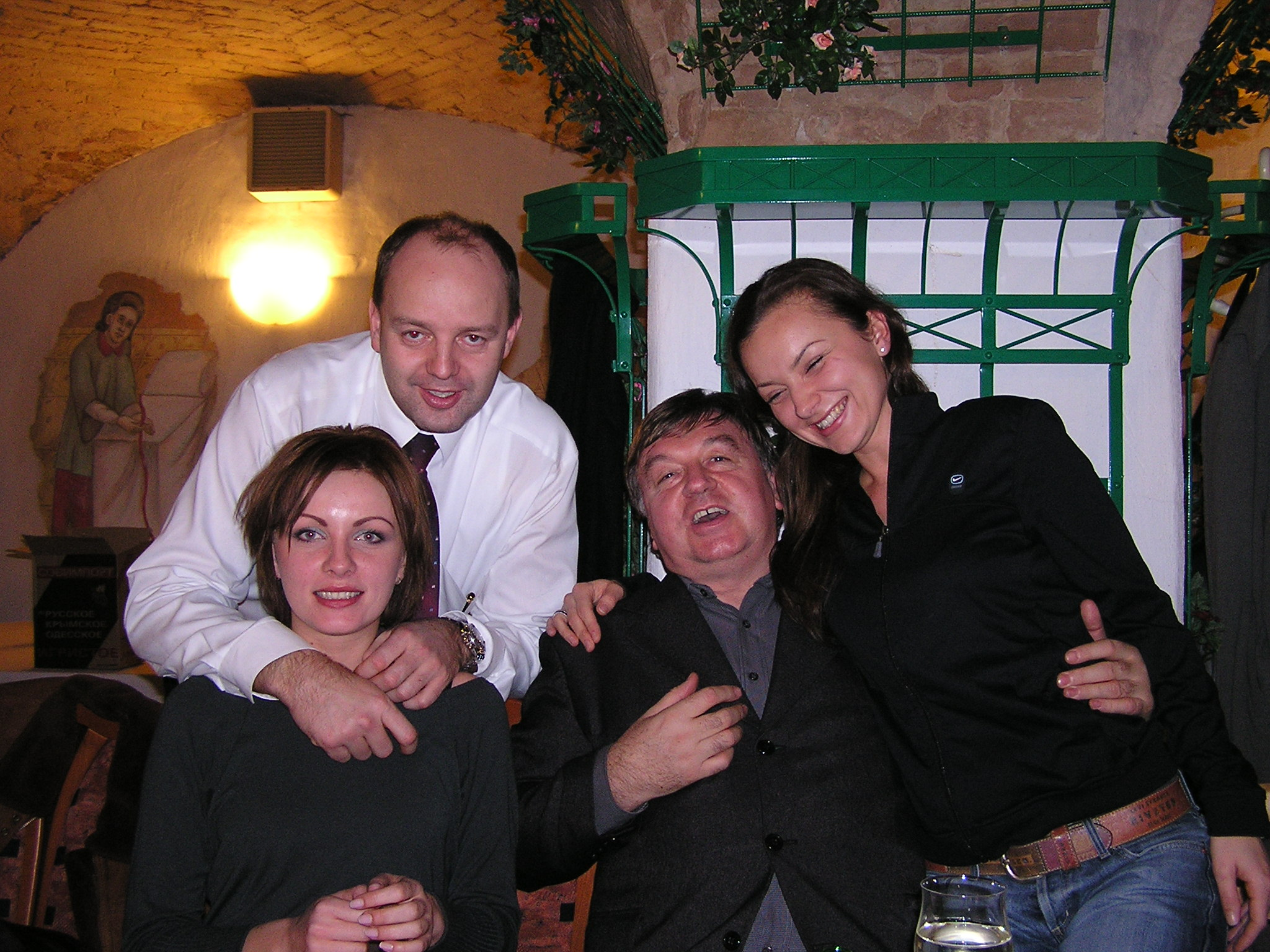 Pavol Rusko at Markiza.sk Party